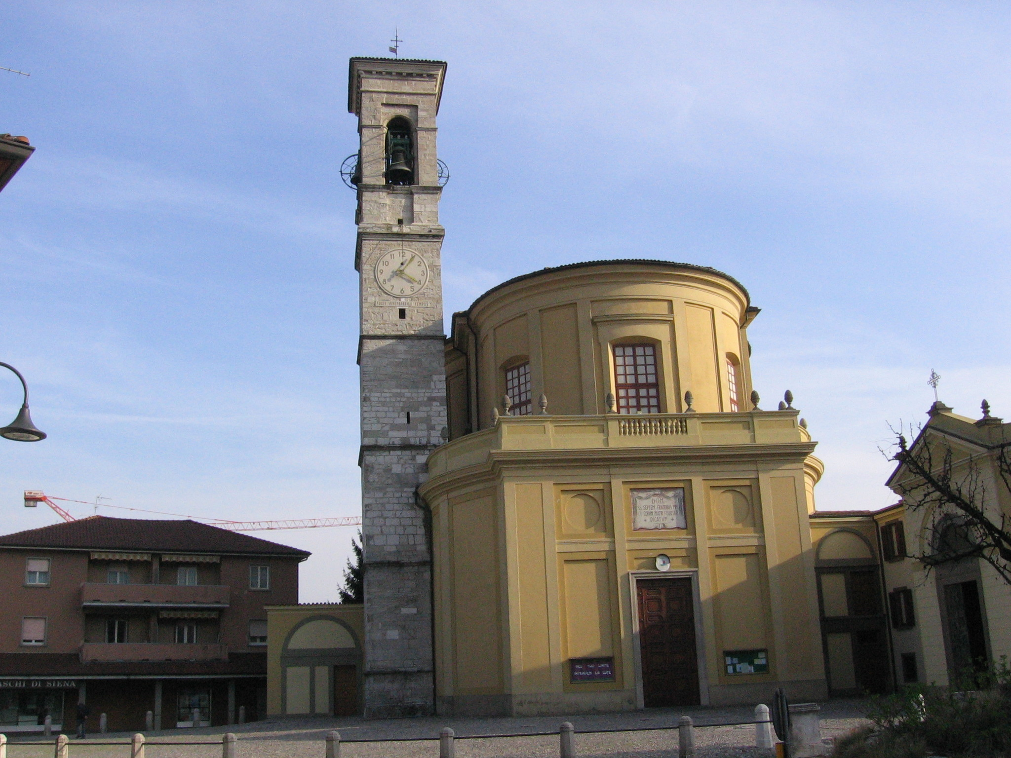 Ranica, Bergamo, Italia